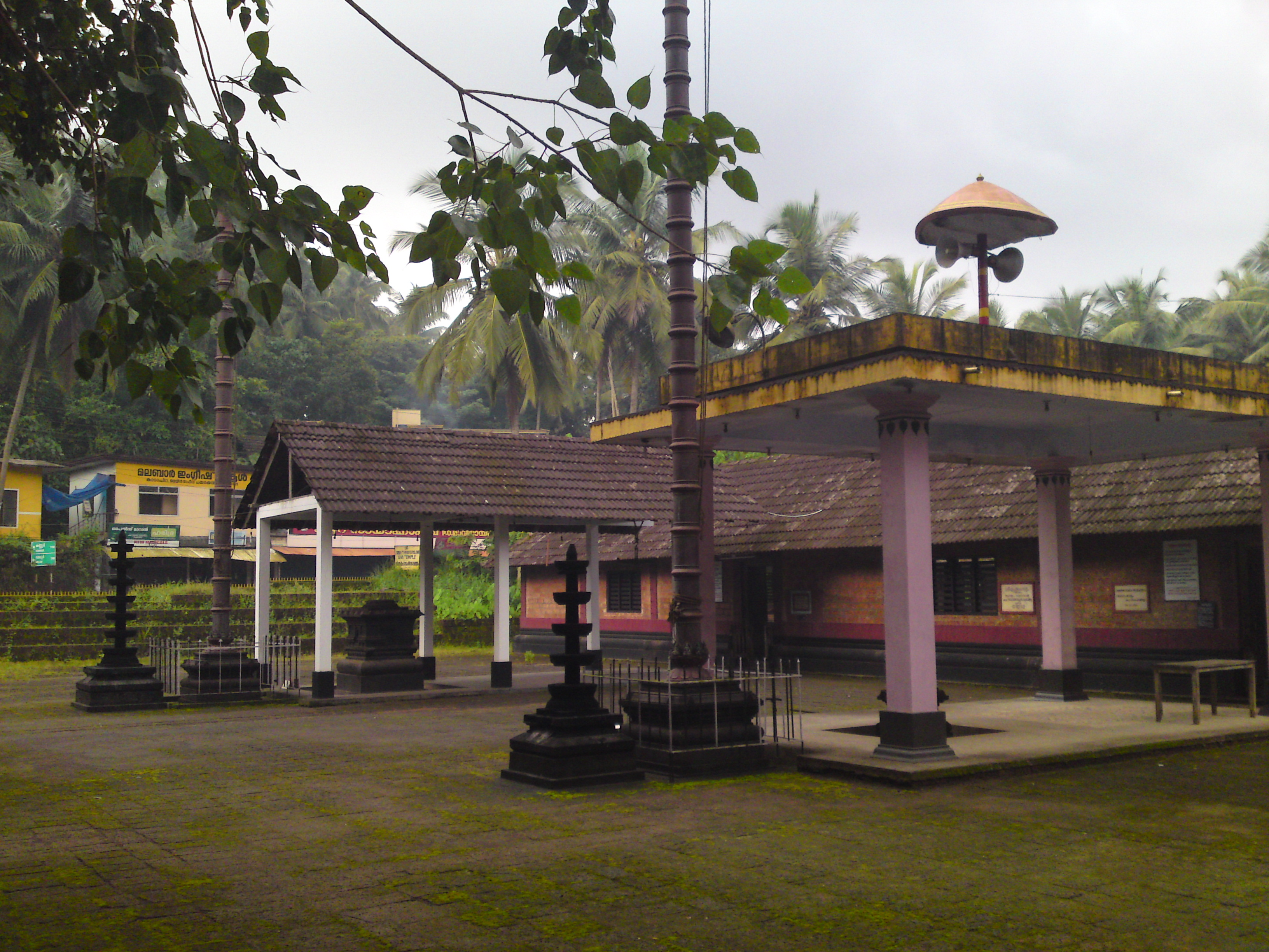 കാടാച്ചിറ തൃക്കപാലം ക്ഷേത്രം